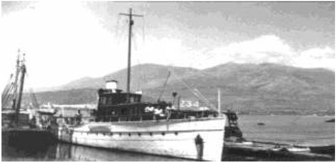 היכטה אלבטרו מתנת ראש ממשלת איטליה אלצ'ידה דה גספרי לבן גוריון שהועברה לחיל הים הישראלי